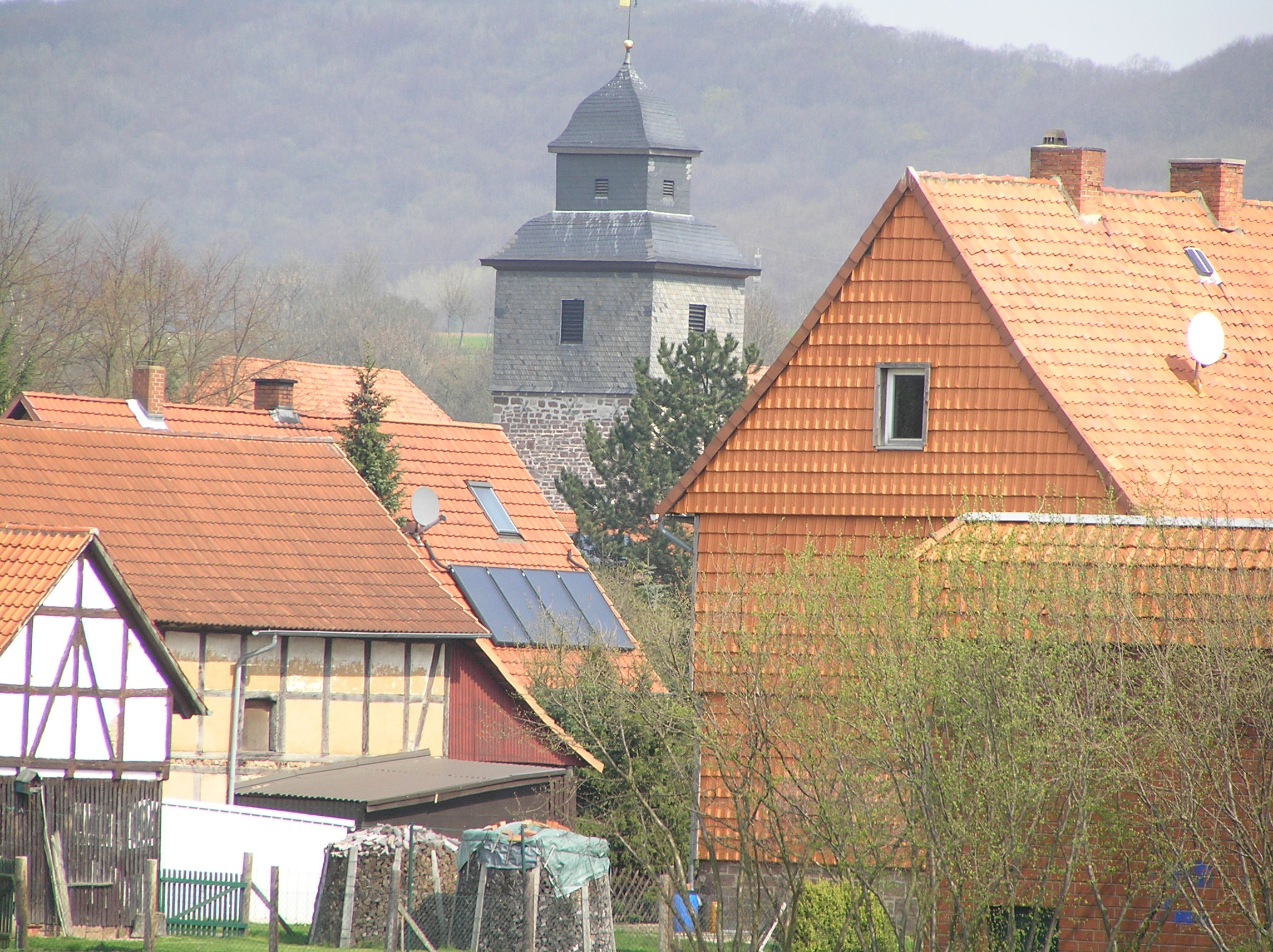 Diemarden - Blick auf Ortskern mit Kirche